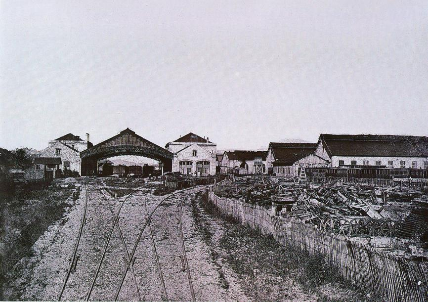 La estación de Pamplona en 1870